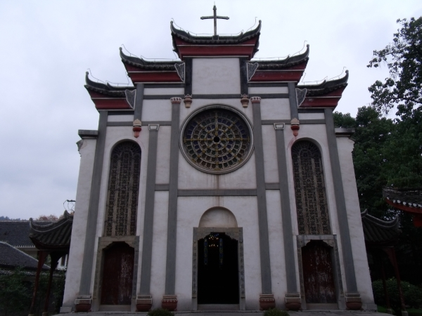 中文（中国大陆）: 红花岗杨柳街天主堂。